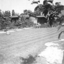 Bundesgartenschau 1957 in Köln - Hausgarten